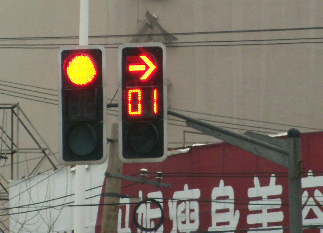 Feu à décompte chinois.